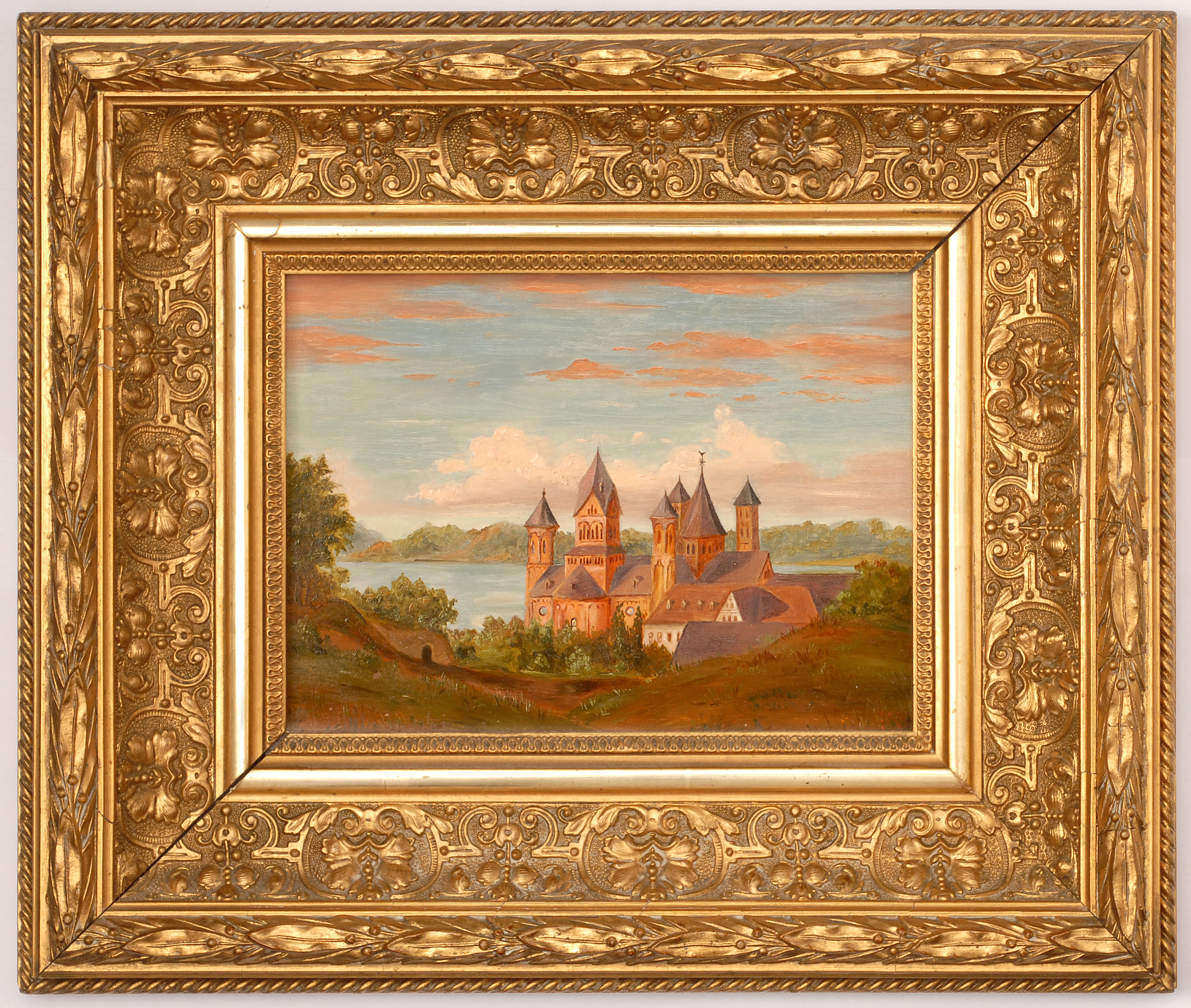 Kloster Laach, Foto eines Ölbildes auf Holz im Originalrahmen